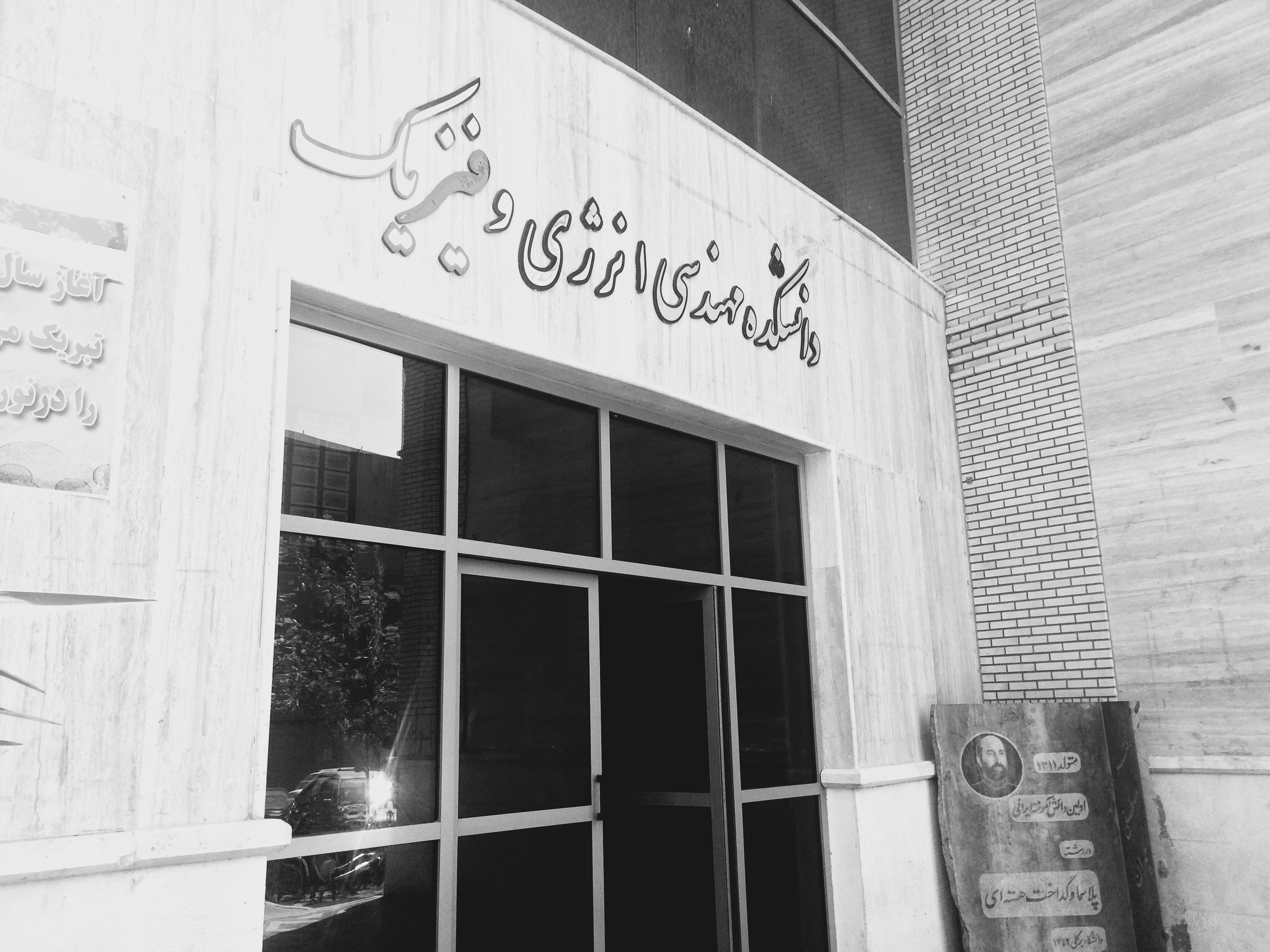 سردر دانشکده فیزیک دانشگاه صنعتی امیرکبیر